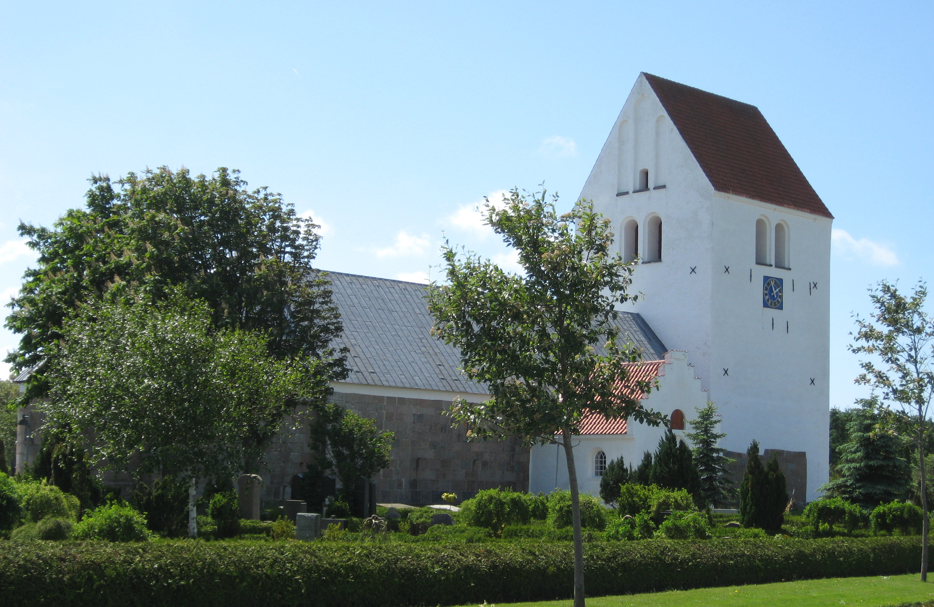 Jetsmark Kirke, Jammenbugt Kommune